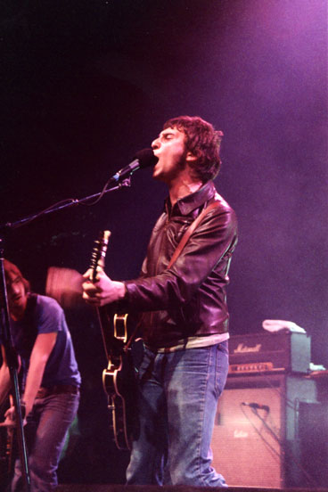 Nic Cester